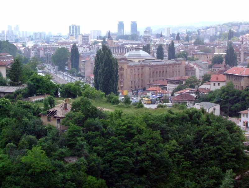 Sarajevo panorama (A view from Hotel Saray)